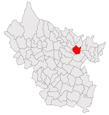 Categorie:Hărţi ale judeţului Buzău